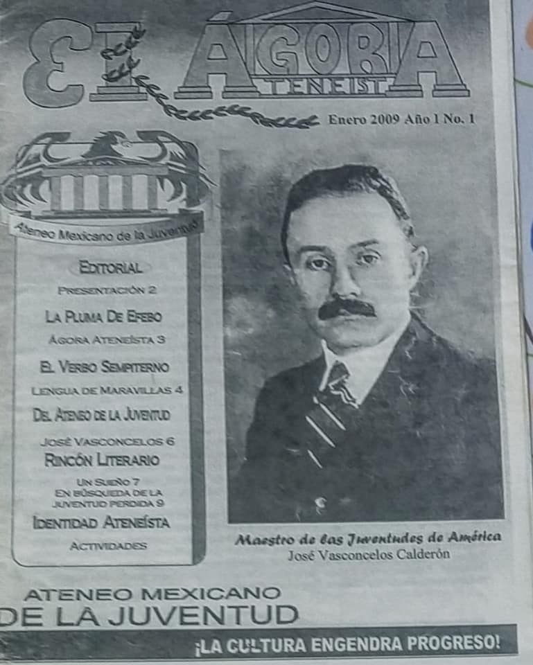 Boletín del Ateneo Nacional de la Juventud / Edición José Luis Gallegos